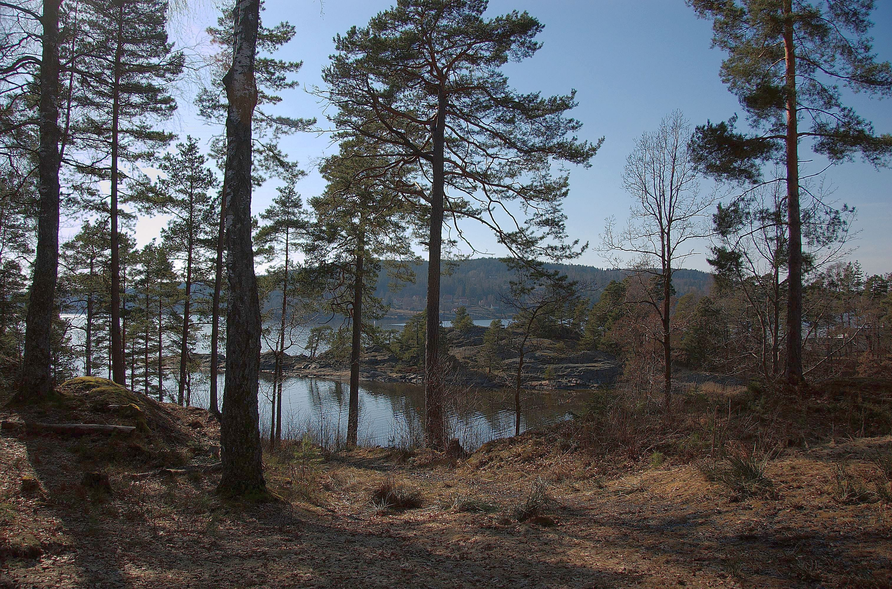 Sjøhagen ved Kambo utenfor Moss. Utsikt mot Jeløya.